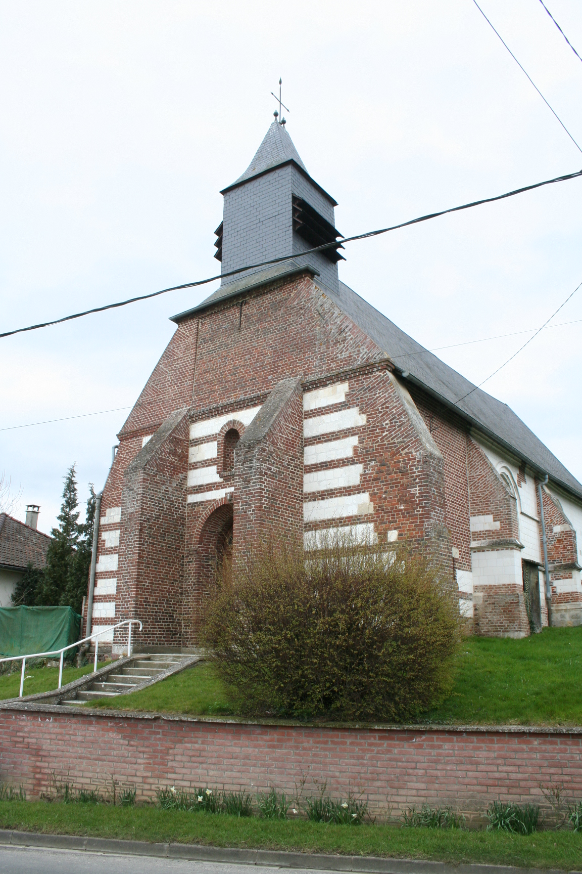 Picard: Église éd Flencamp, Sonme, Picardie